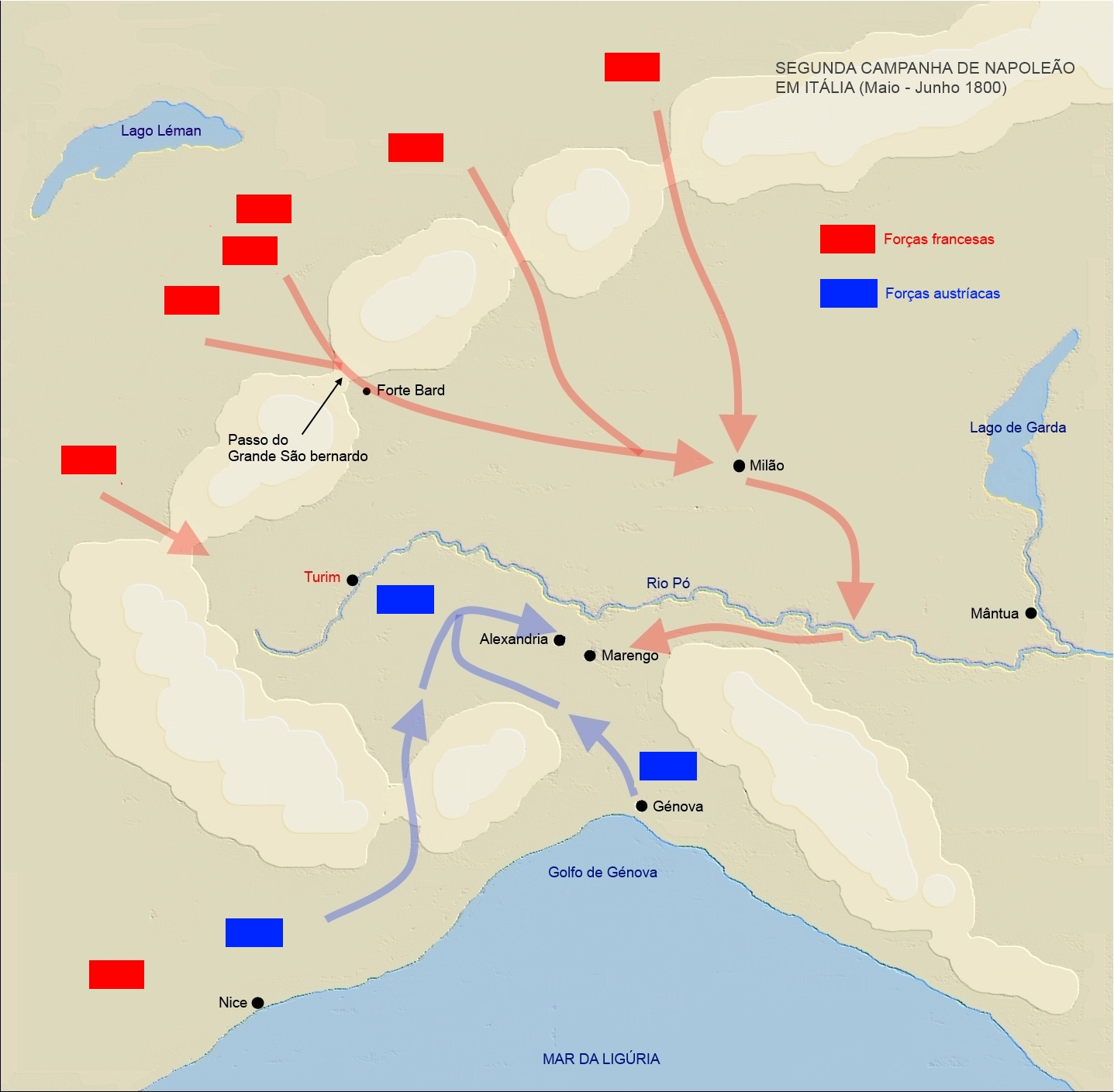 Principais movimentos durante a Segunda Campanha de Napoleão em Itália.